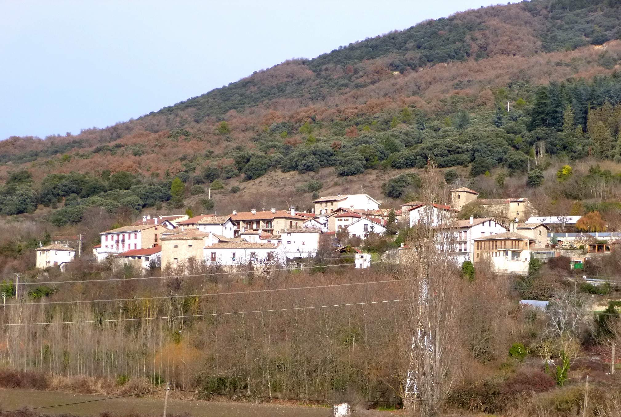 Pueblo viejo de Berriozar (Navarra)